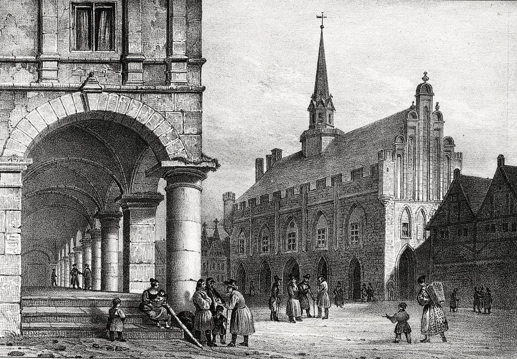 Das Rathaus zu Marienburg, Lithographie : 18 x 12 cm, Heinrich Wilhelm Teichgräber